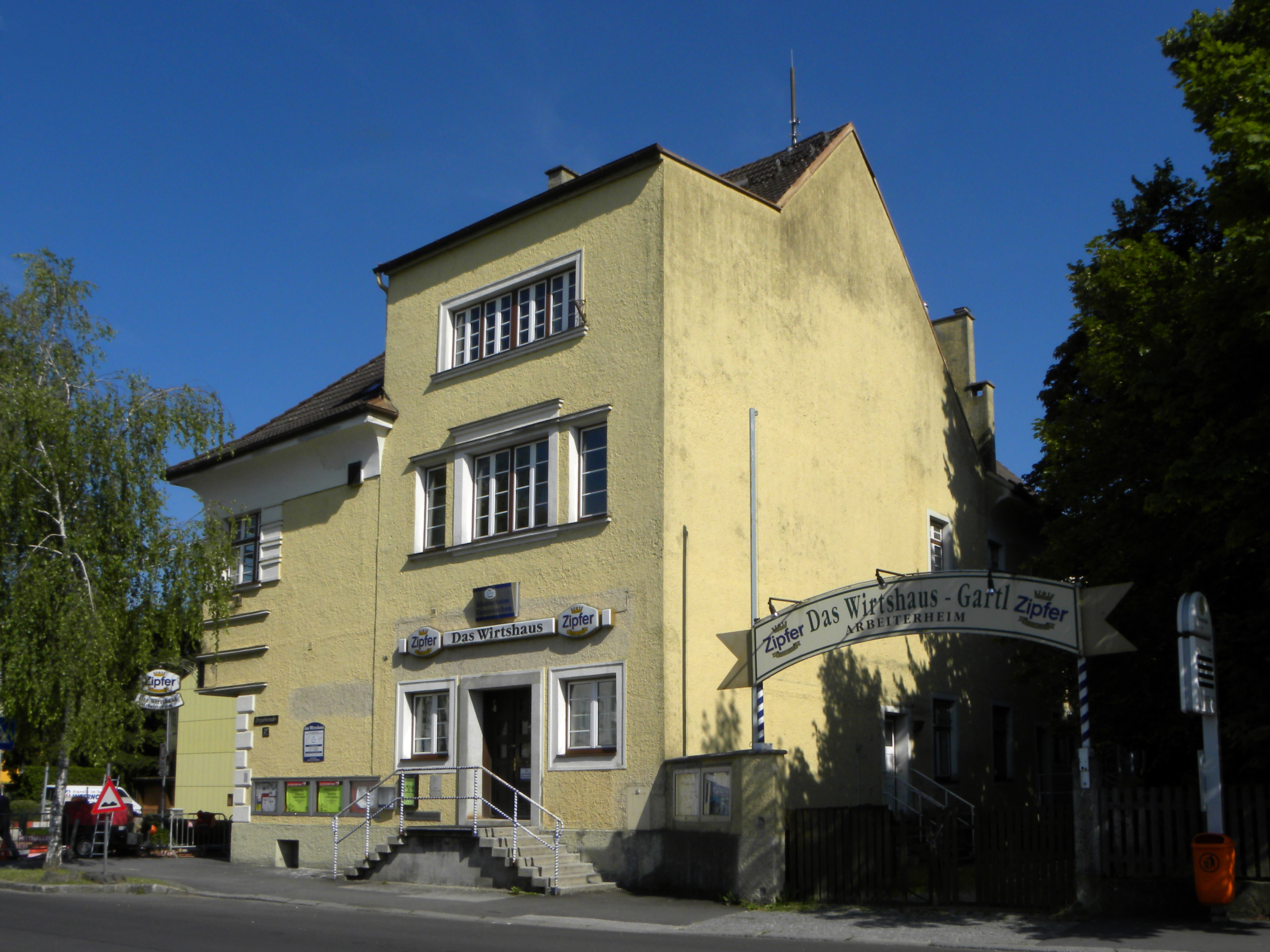 Das Arbeiterheim Linz-Kleinmünchen in der Zeppelinstraße 29/Dürerstraße 24 wurde in den Jahren 1928/29 errichtet.